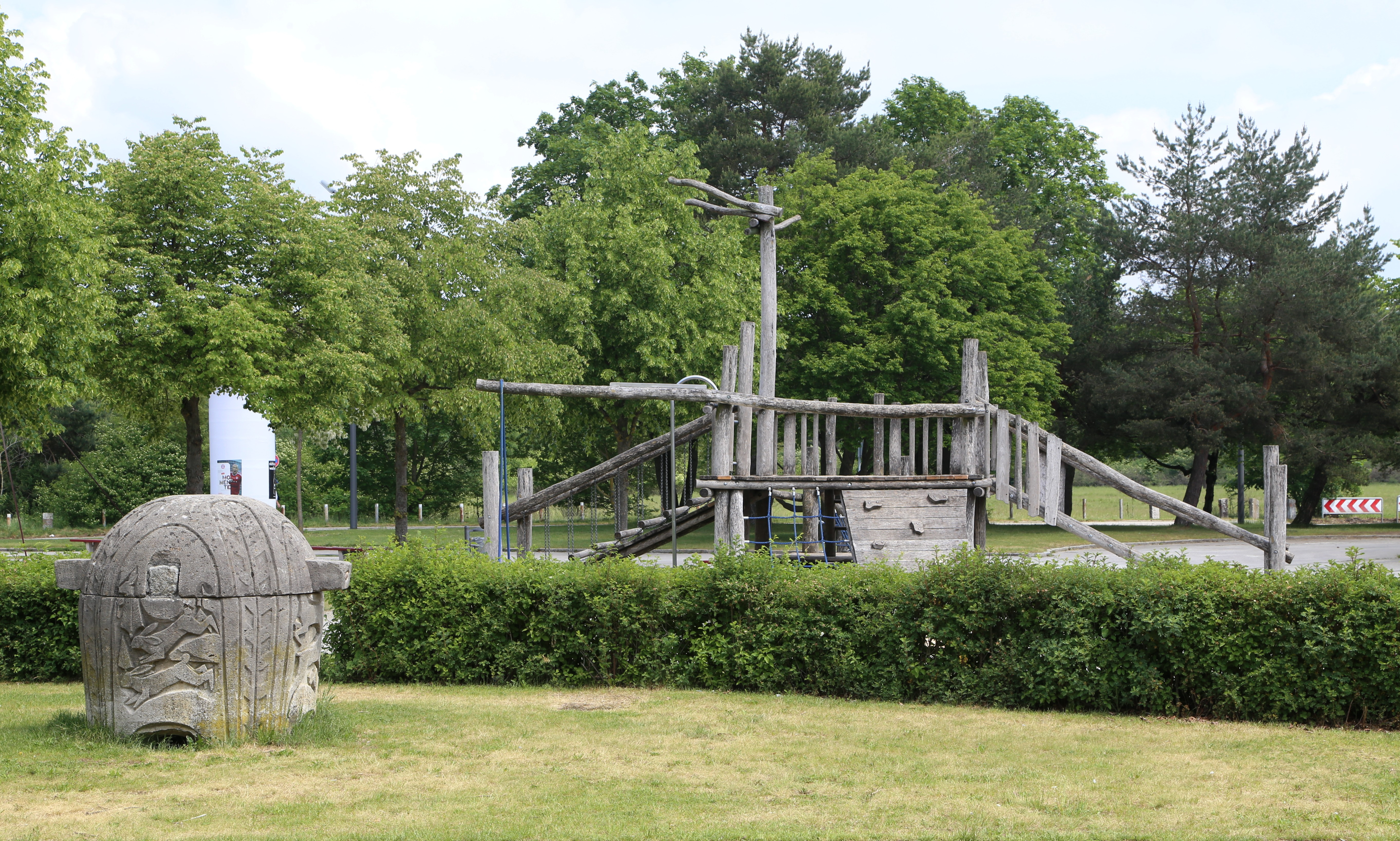 Goldschmiedplatz, Hasenbergl, München